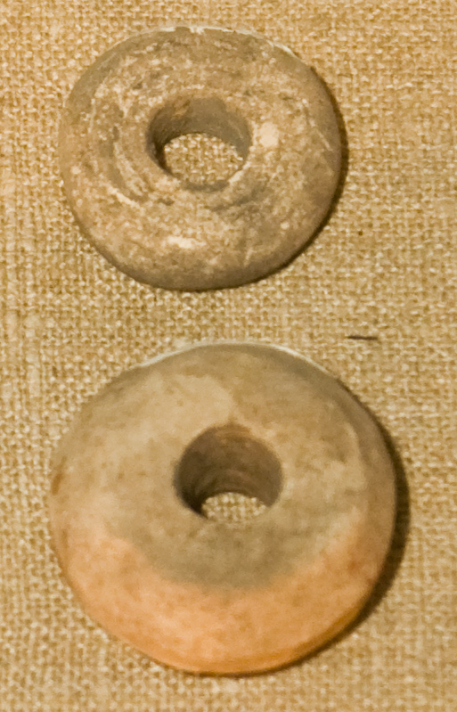 Пряслица (VIII-IX век). Археологические раскопки 1970ых годов, городище Камно, Псковская область. Государственный музей истории Санкт-Петербурга.